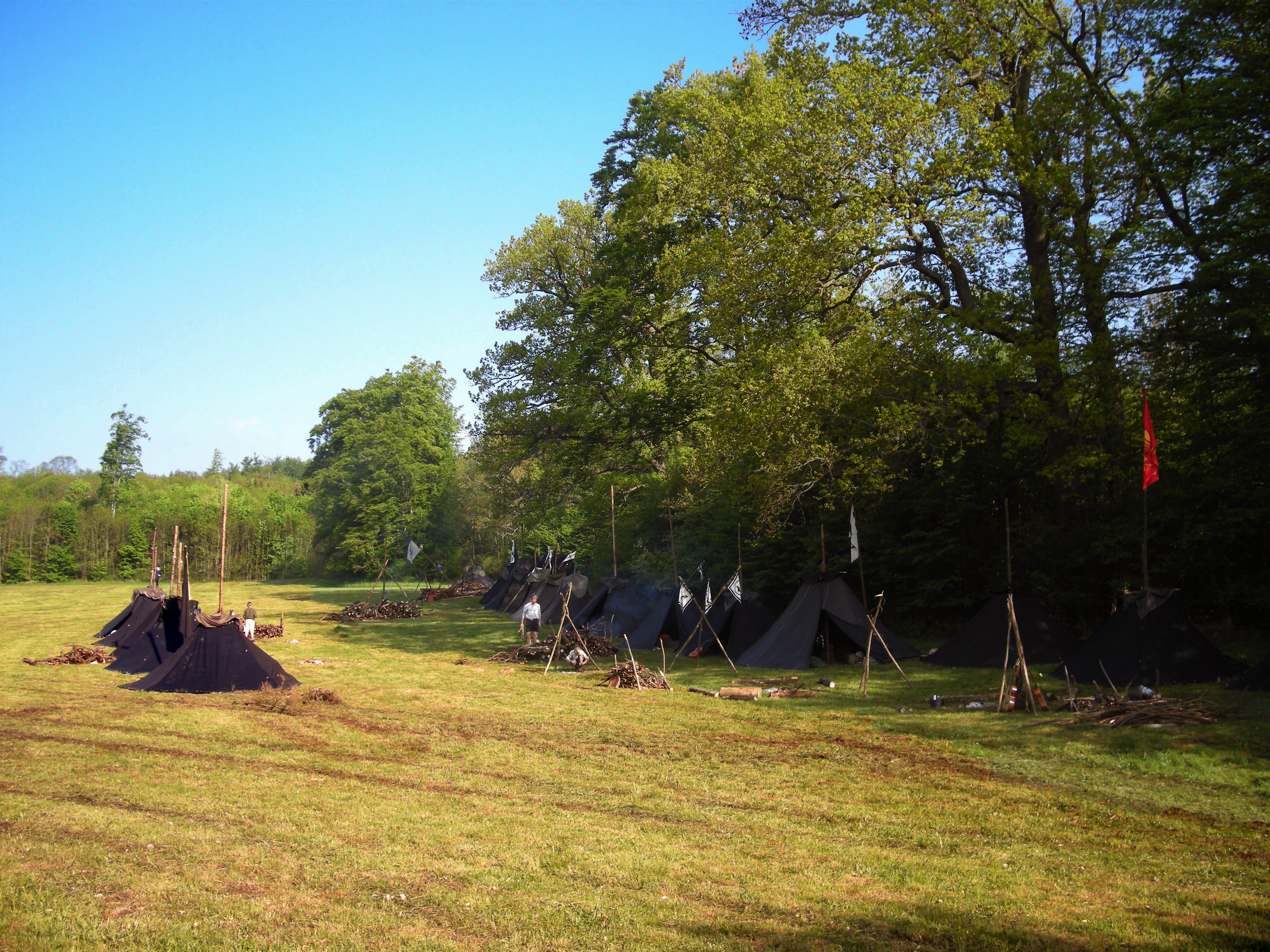 Bundeslager des Nerother Wandervogels (2010)